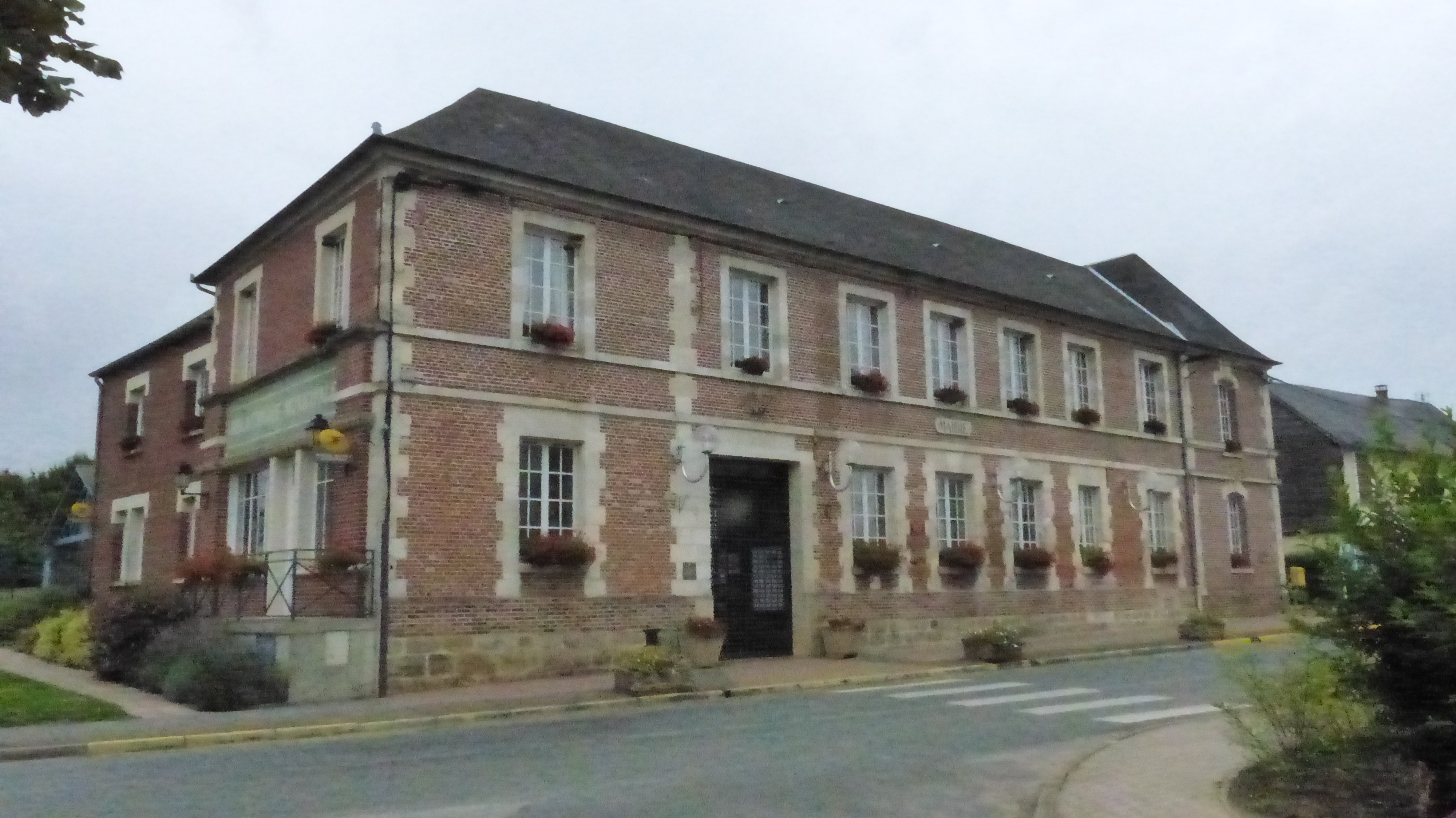 Mairie de Wavignies